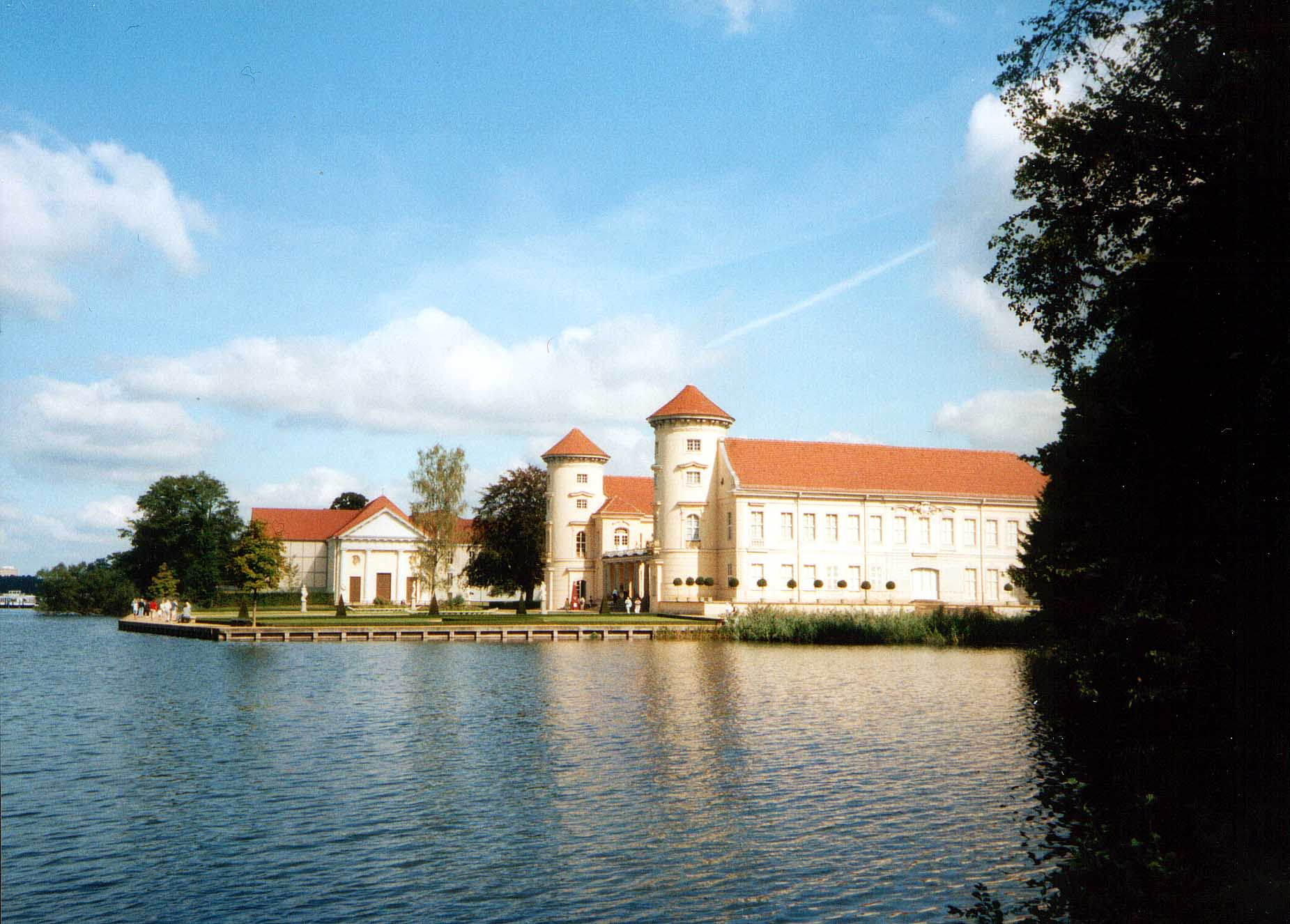 Schloss Rheinsberg Selbstfotografiert von Hejkal September 2002